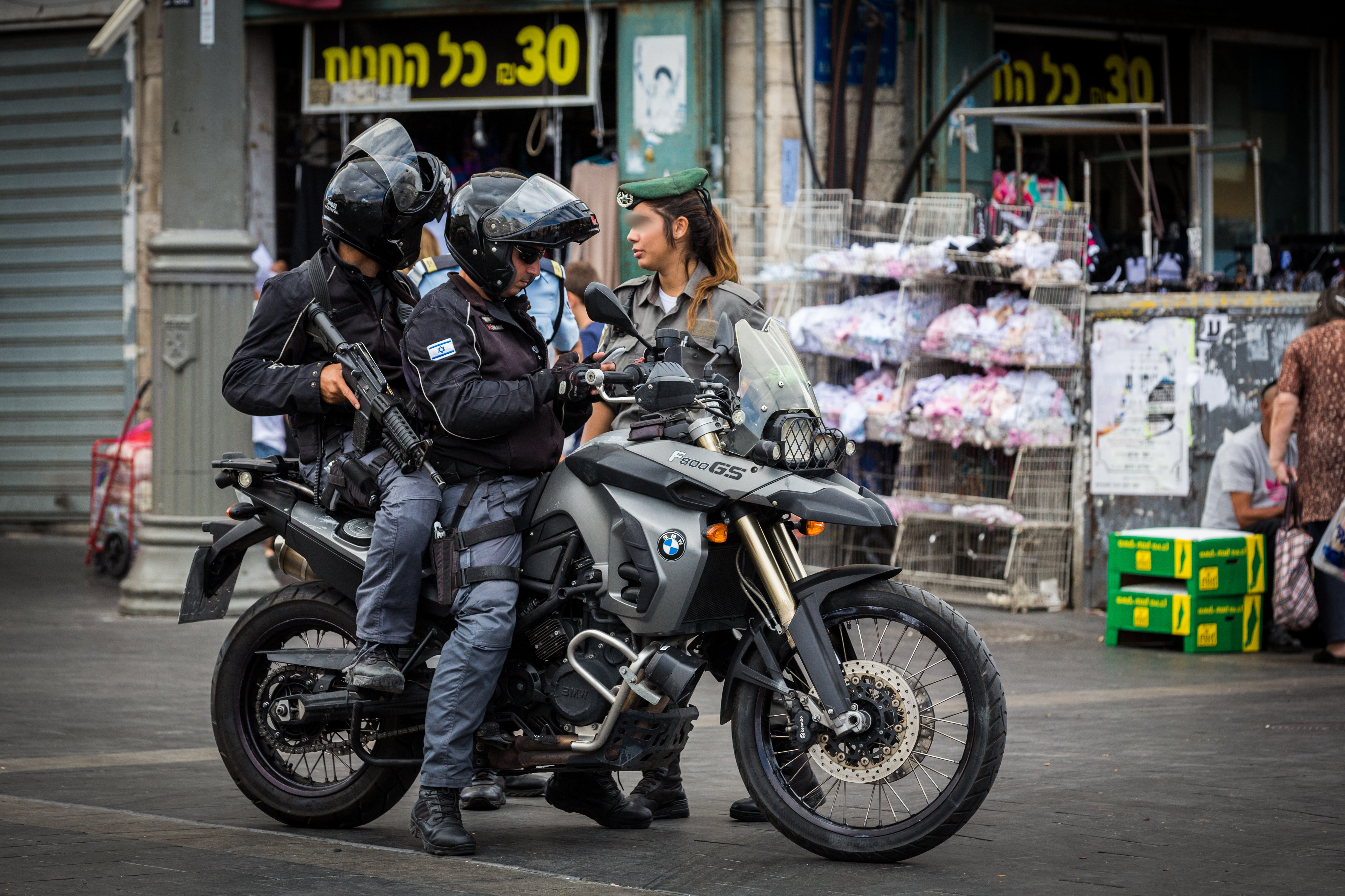 Patrouille de police « Yasam » sur une moto BMW F800GS à Jérusalem en juillet 2014.